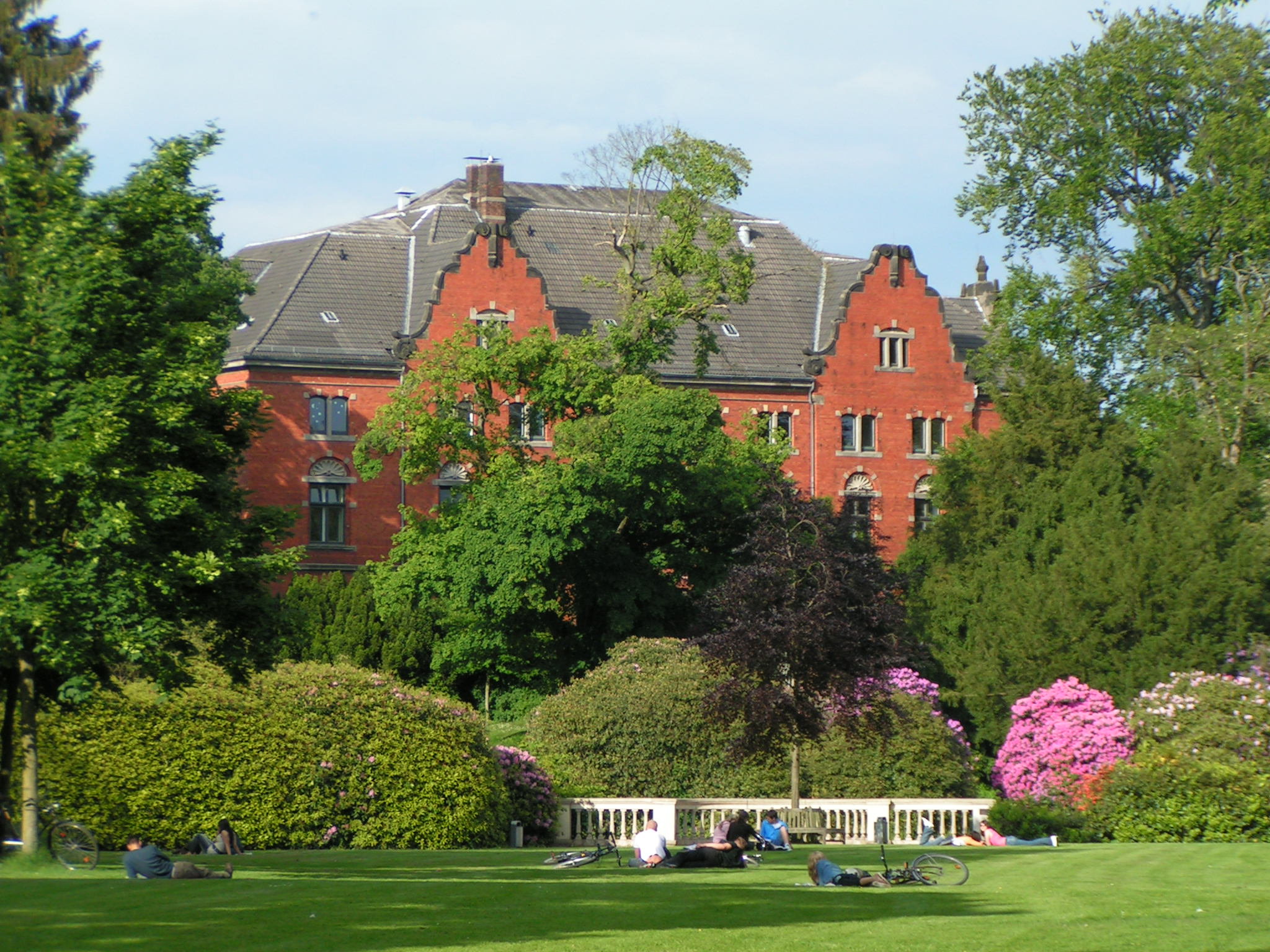 Schlossgarten Oldenburg zur Rhododendronblüte. Im Hintergrund das Elisabeth-Anna-Palais